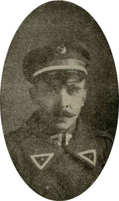 Беларуская (тарашкевіца): Аляксандар Ружанцоў, маёр летувіскага войска (1919 г.)